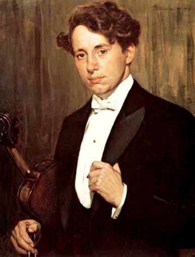 Giuseppe Barison : Il figlio Cesare con il violino